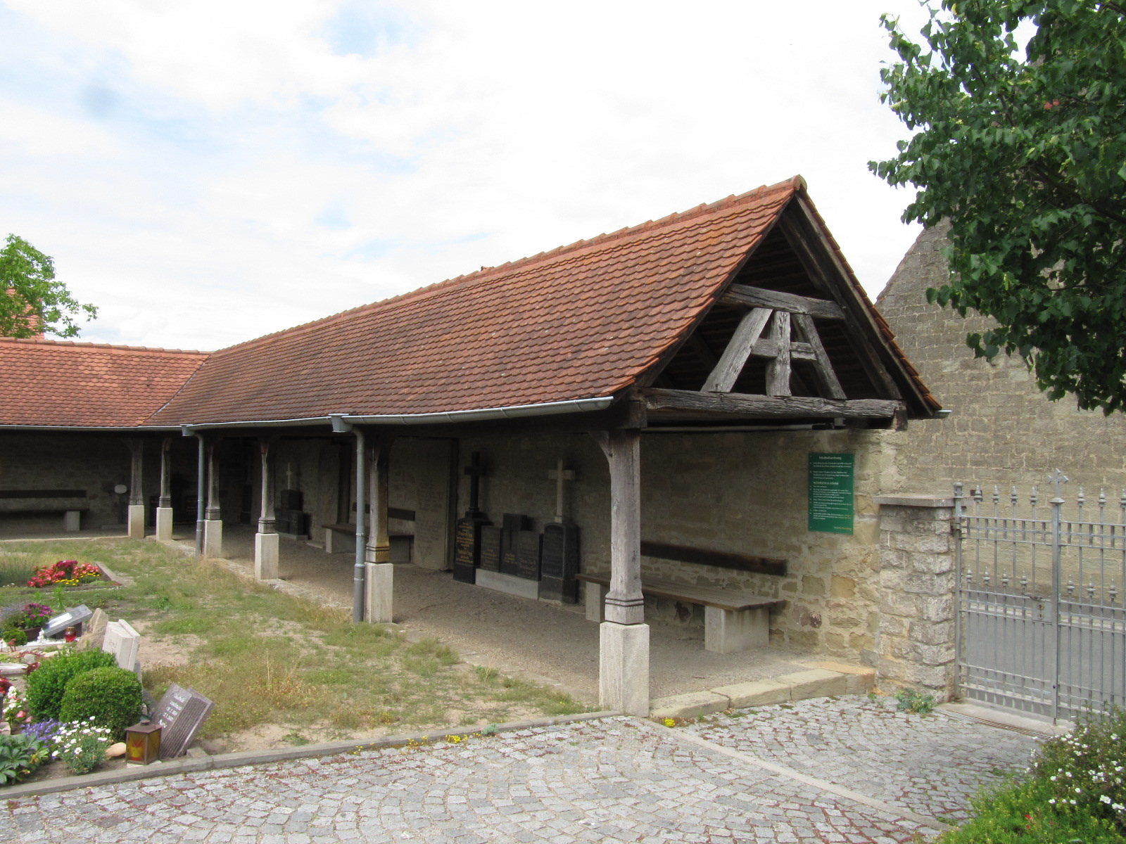 Im Arkadengang des Friedhofs Wiesenbronn steht die Gemeinde bei Gottesdiensten. Außerdem finden sehenswerte alte Grabsteine einen geschützten Platz.